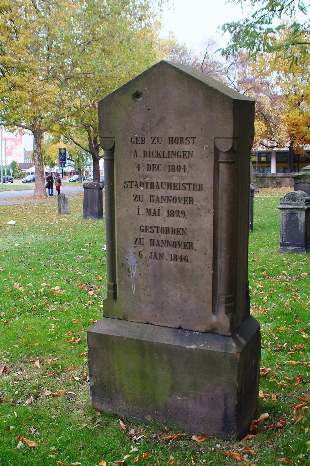 Grabmal des vor allem in Hannover tätigen Stadtbaumeisters August Heinrich Andreae auf dem Alten St.-Nikolai-Friedhof Grabmal nahe dem Klagesmarkt-Kreisel Ecke Celler Straße L